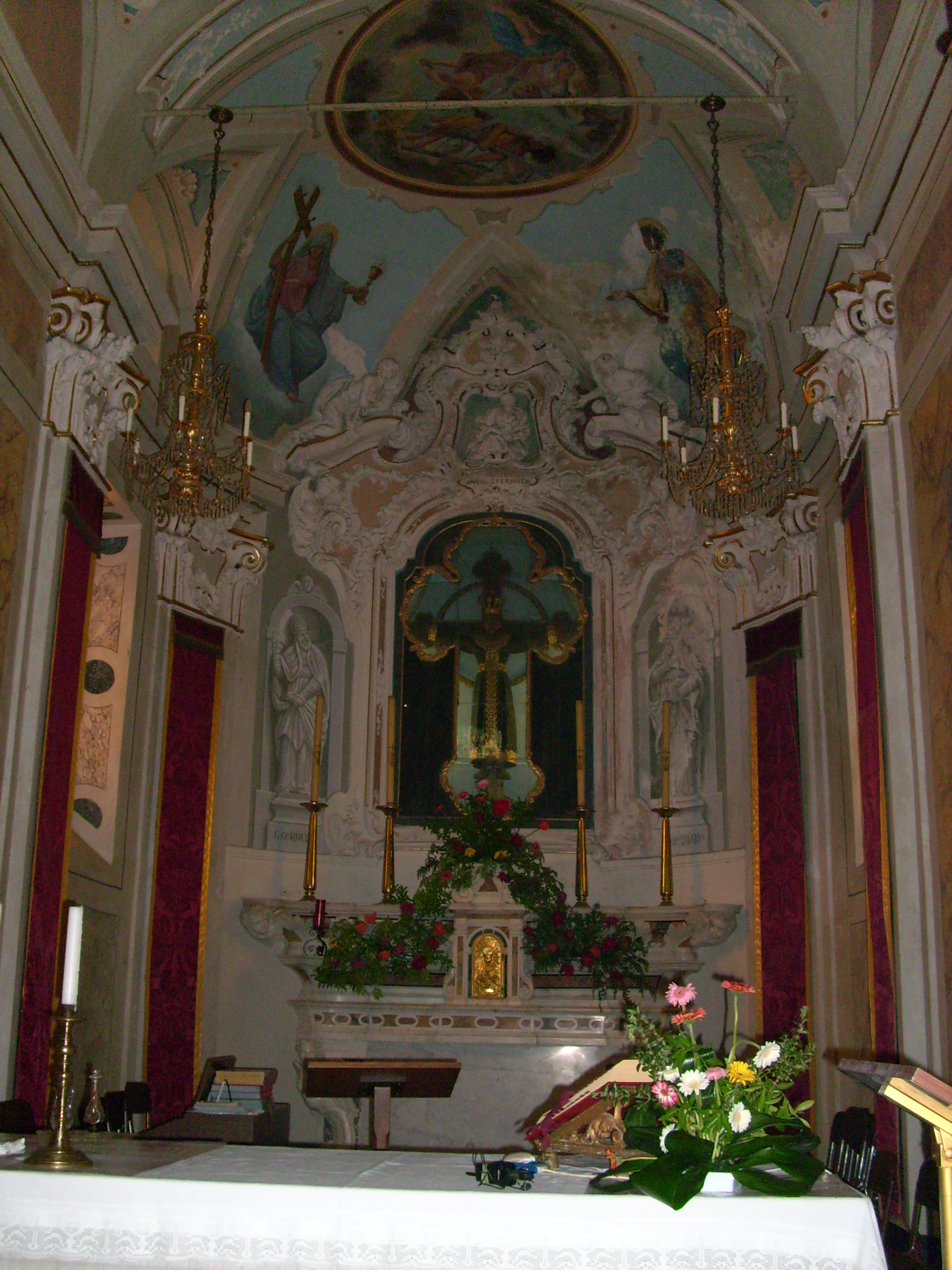 Chiesa di Beverino Castello, Liguria, Italia